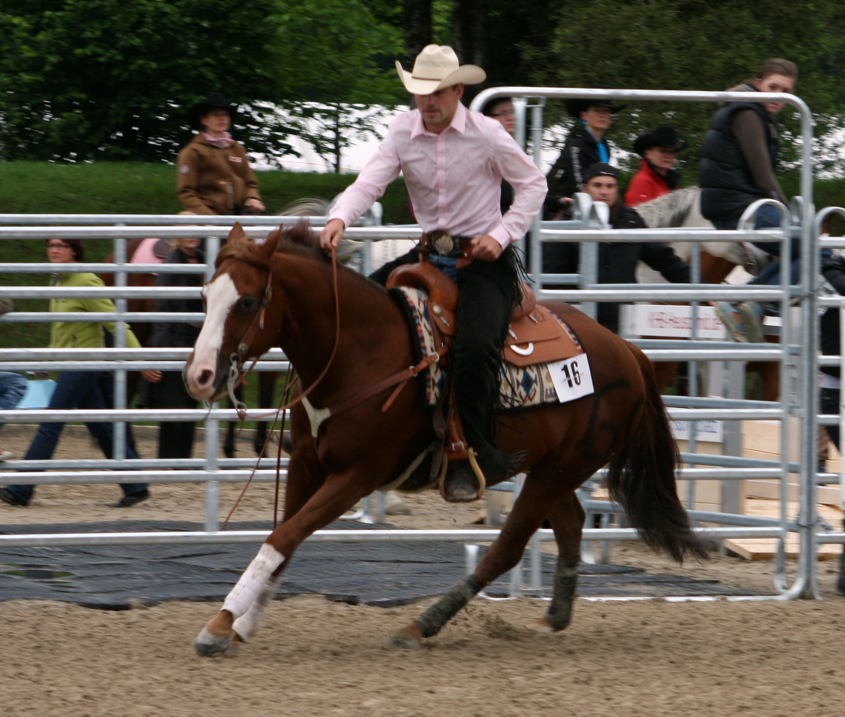 Westernreiten auf der Veranstaltung Pferd International.